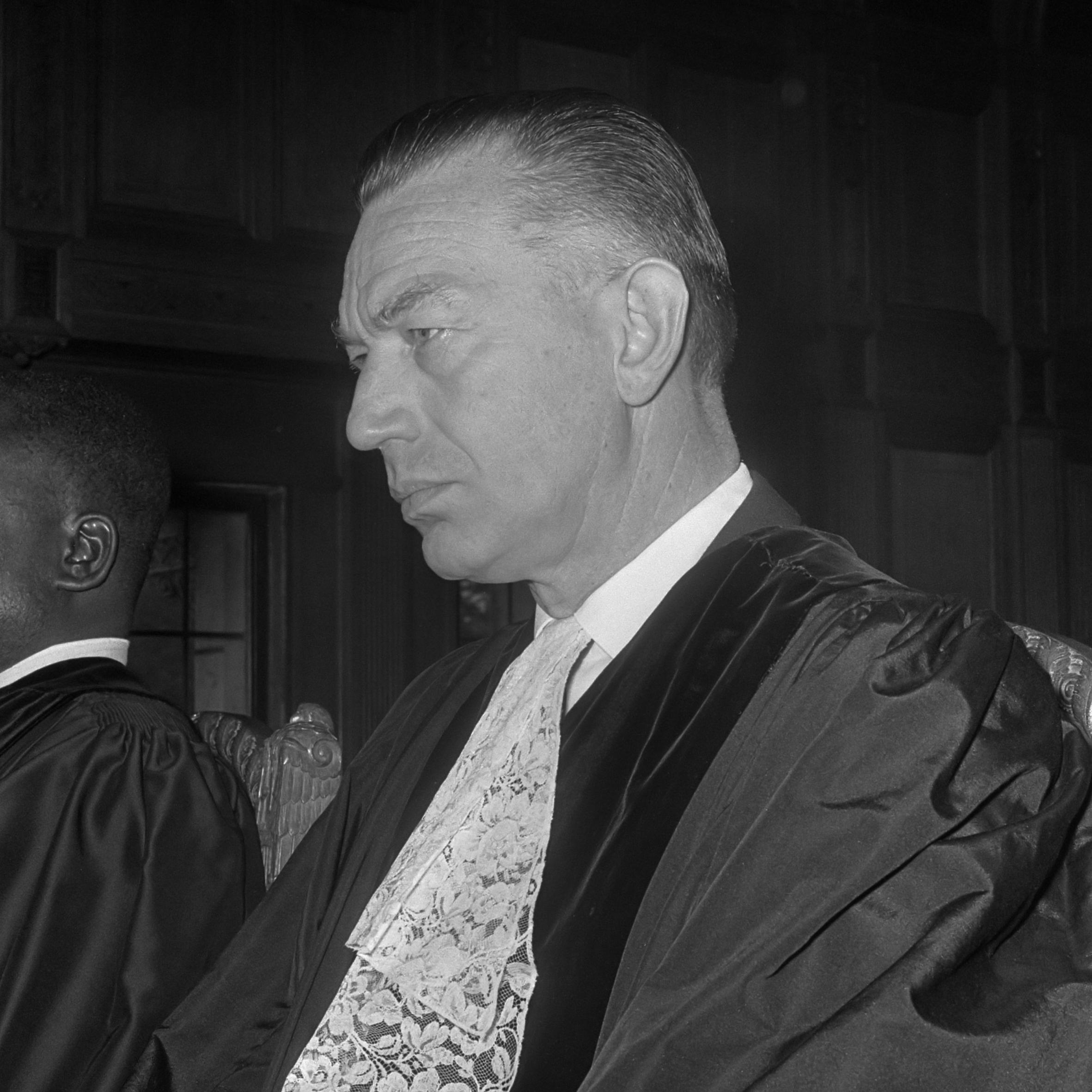 Internationale Hof van Justitie bijeen verdeling Continentale plat Noordzee nr. 13 , 21: Prof. Max Sorensen (Denemarken) 23 oktober 1968